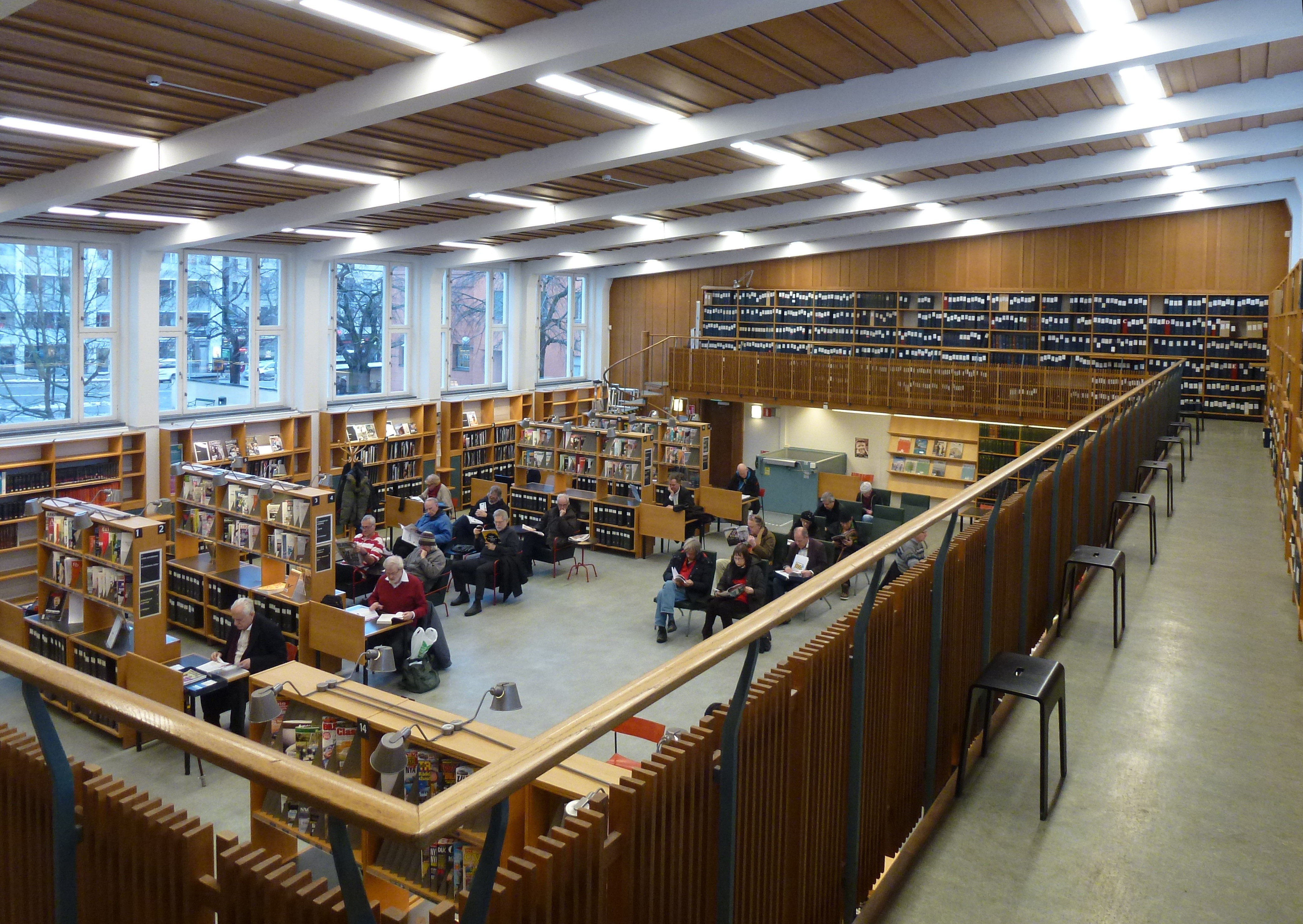 Stockholms stadsbibliotek annexbyggnad för tidningar, tidskrifter (läsesalen)